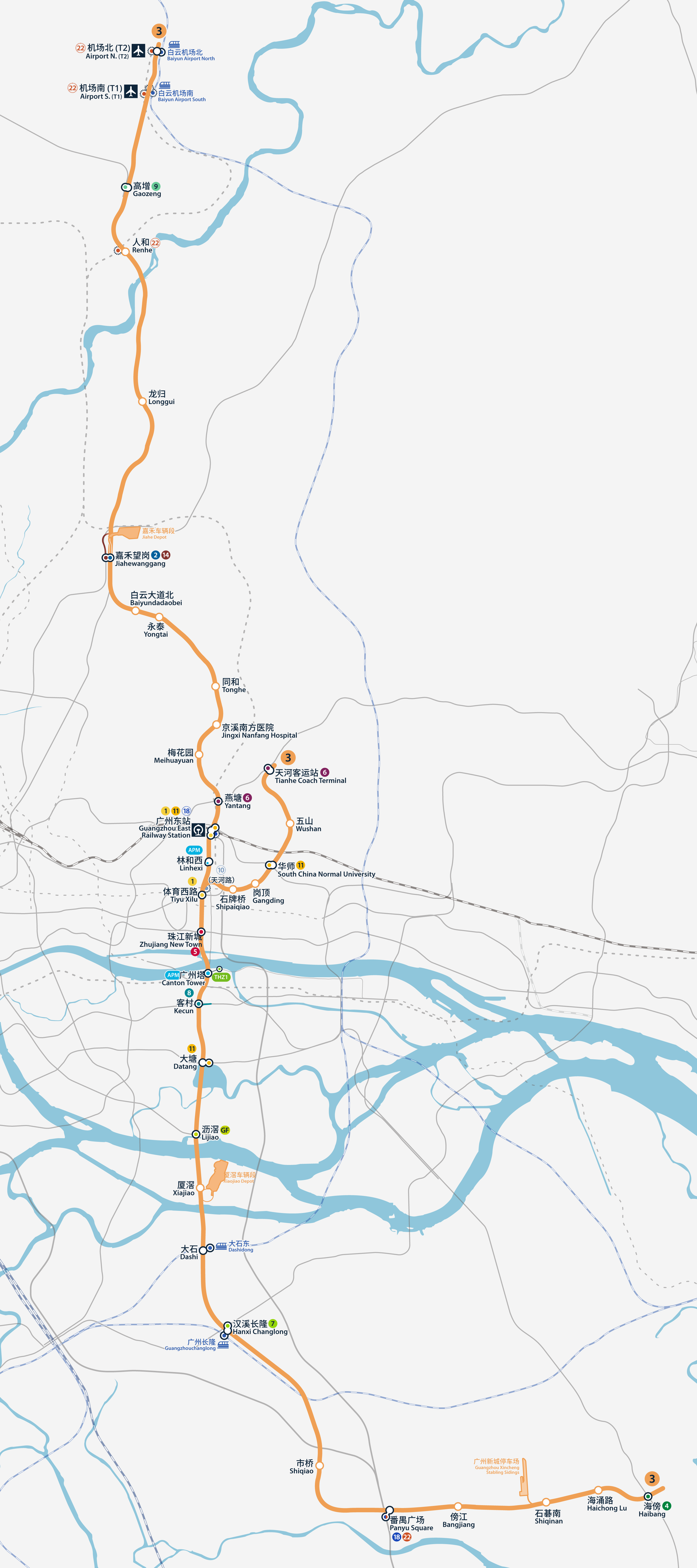 廣州地鐵3號線路線圖，按真實比例繪畫